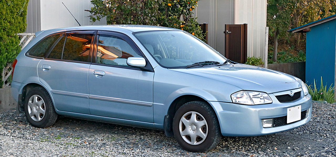 Mazda Familia S-Wagon